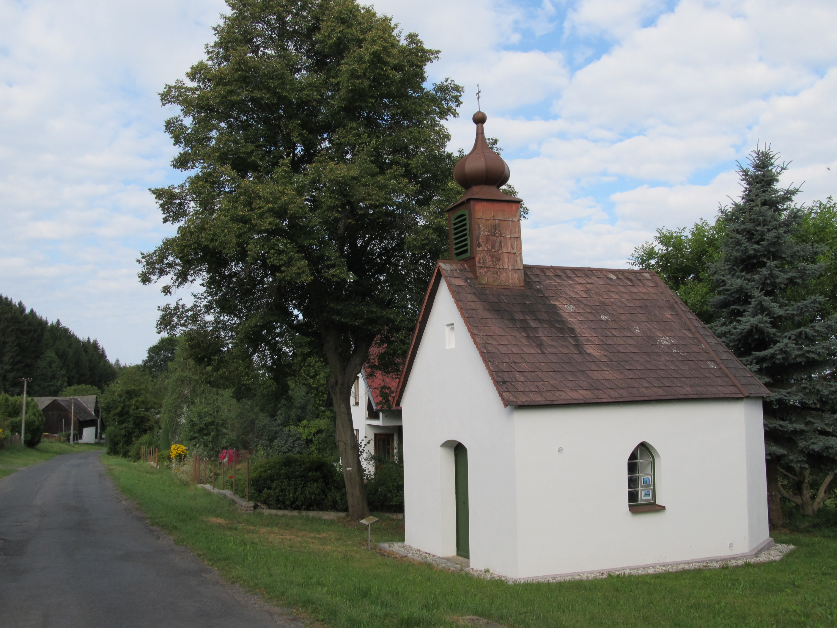 Blata - kaplička